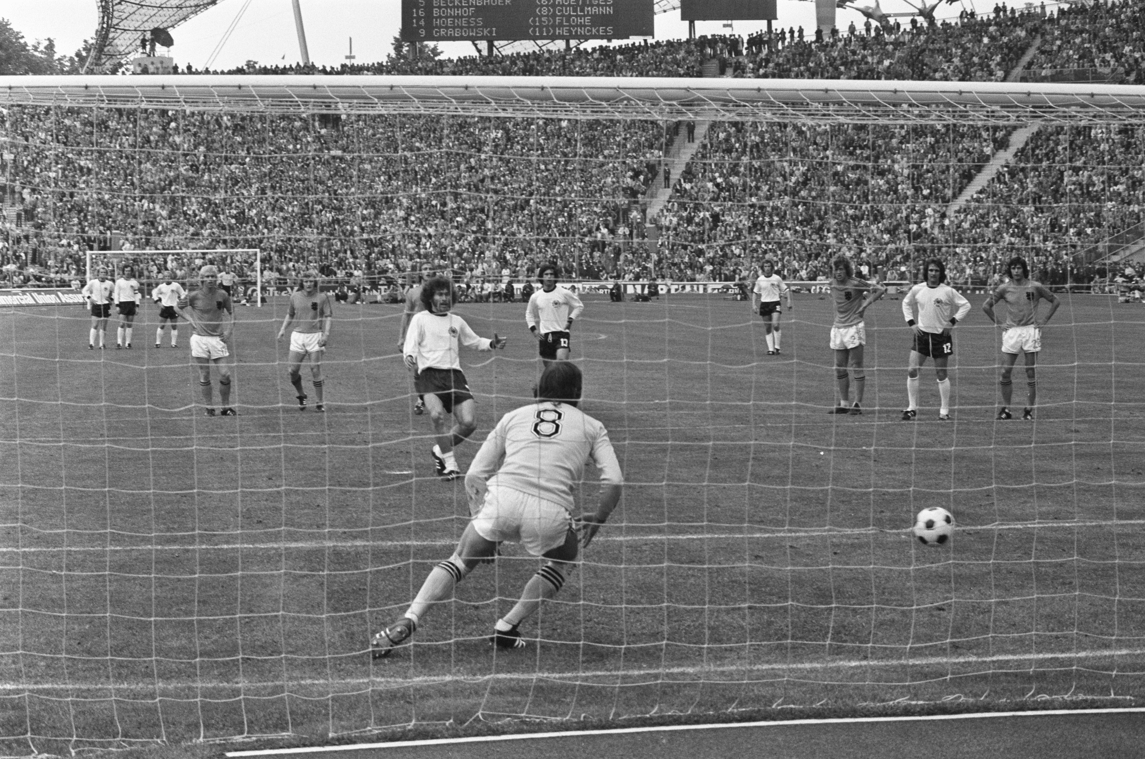 Finale de la Coupe du monde de football 1974 à Munich. Allemagne de l'Ouest - Pays-Bas (2-1), le n°10 allemand Paul Breitner égalise à 1-1 sur penalty.